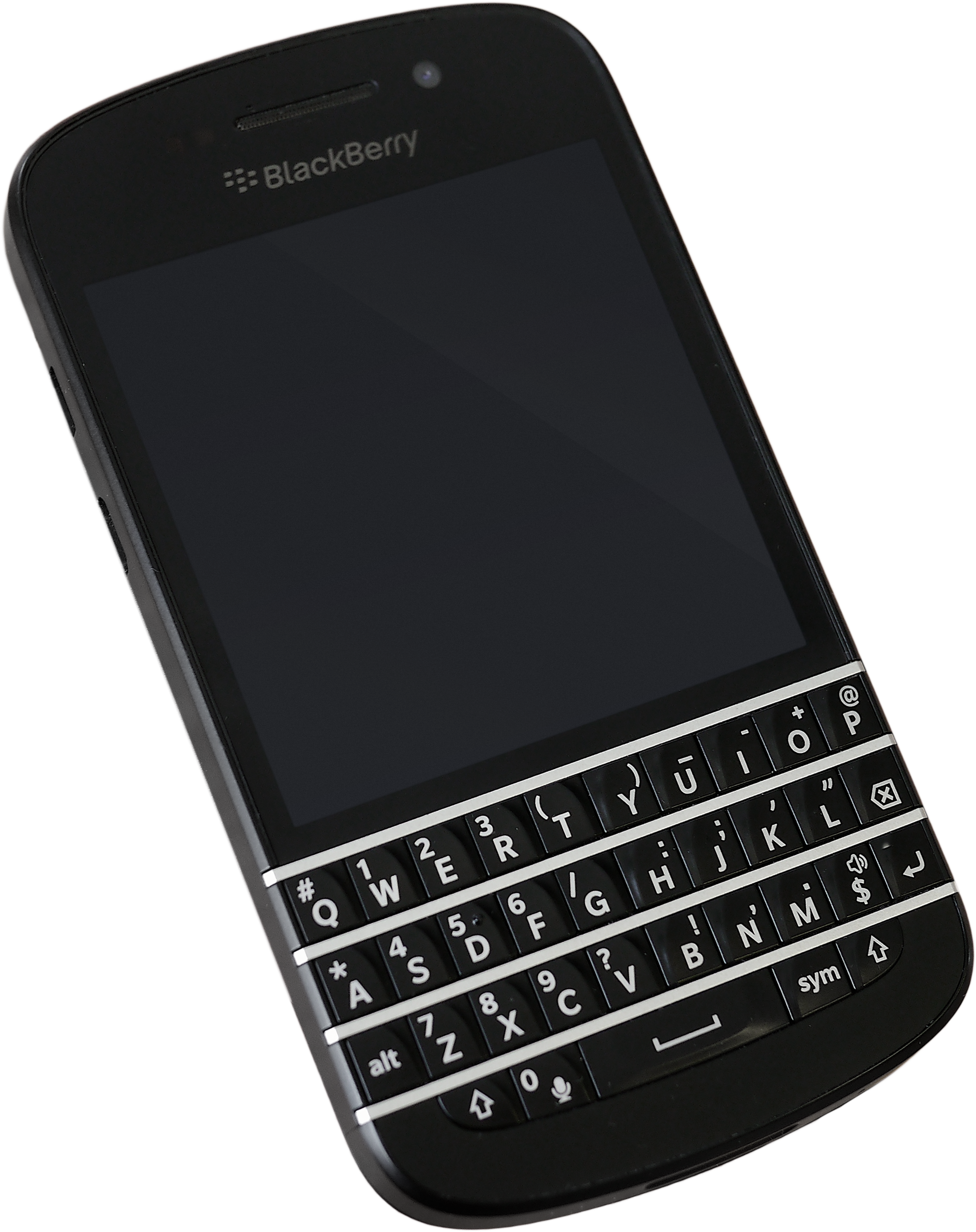 Blackberry Q10, transparent background